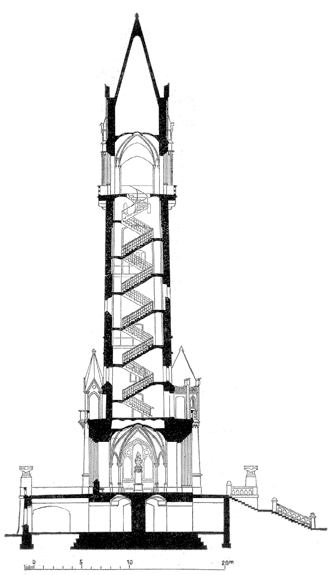 Berlin, Grunewaldturm